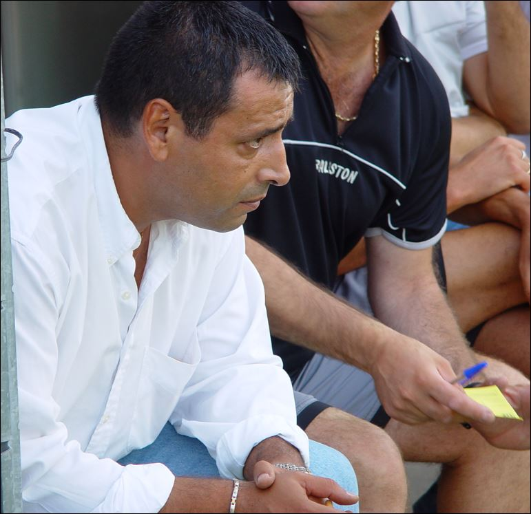 Istres